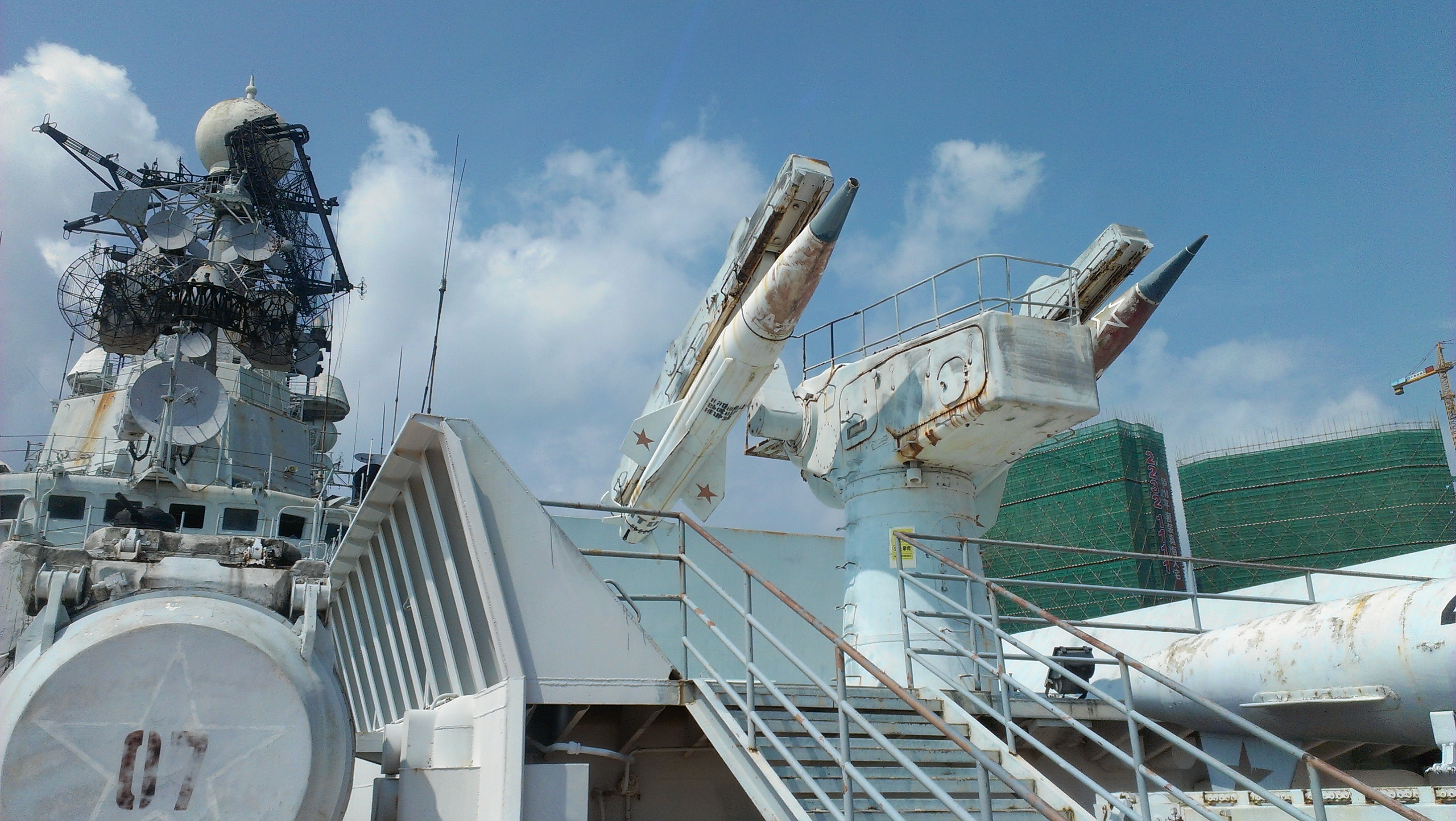 明斯克号上的SA-N-3防空导弹